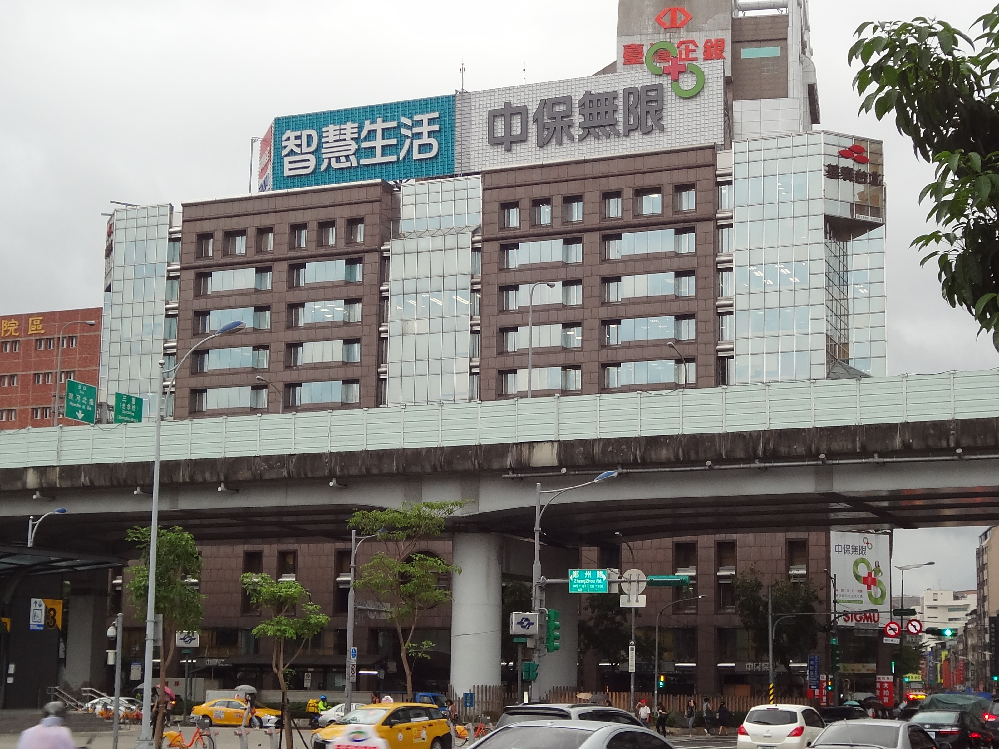 中文（台灣）: 國產實業大樓，位於臺北市大同區鄭州路139號。